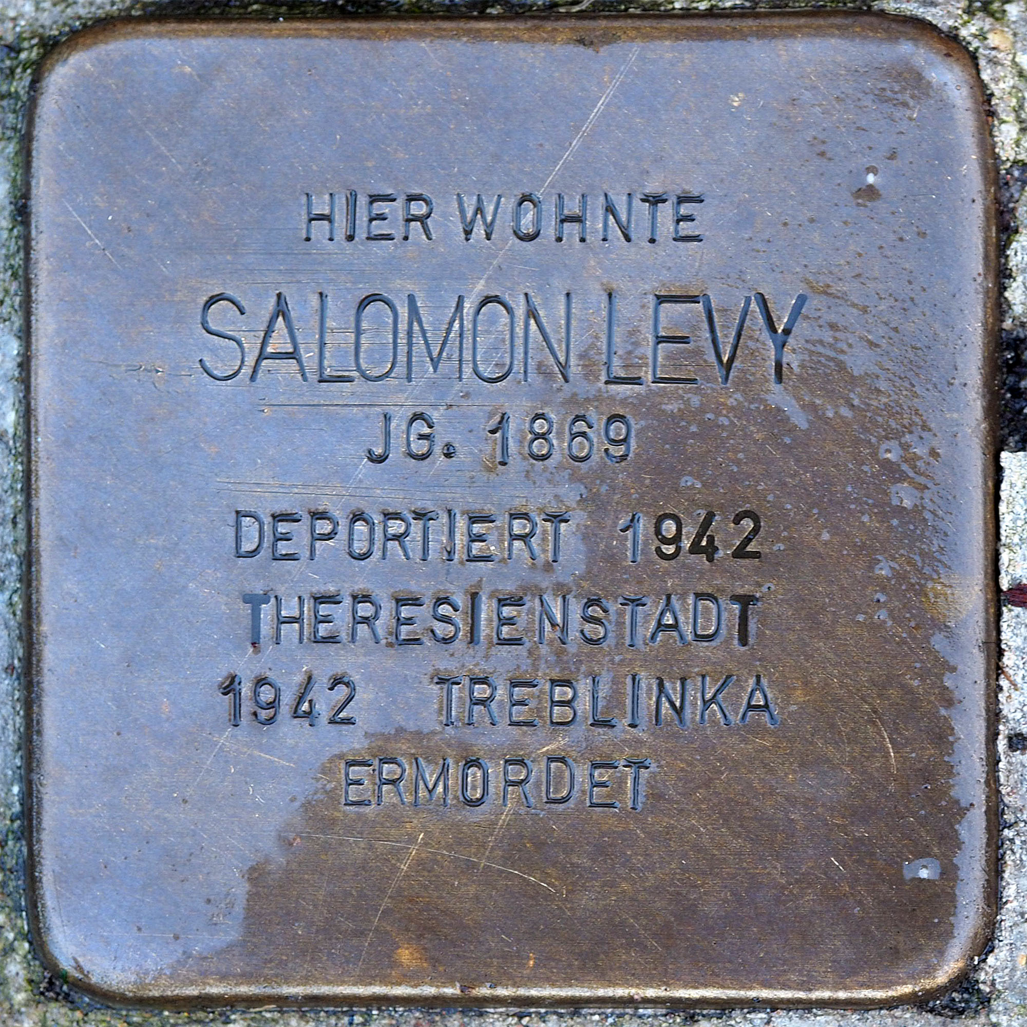 Stolpersteine Grefrath: Levy, Salomon